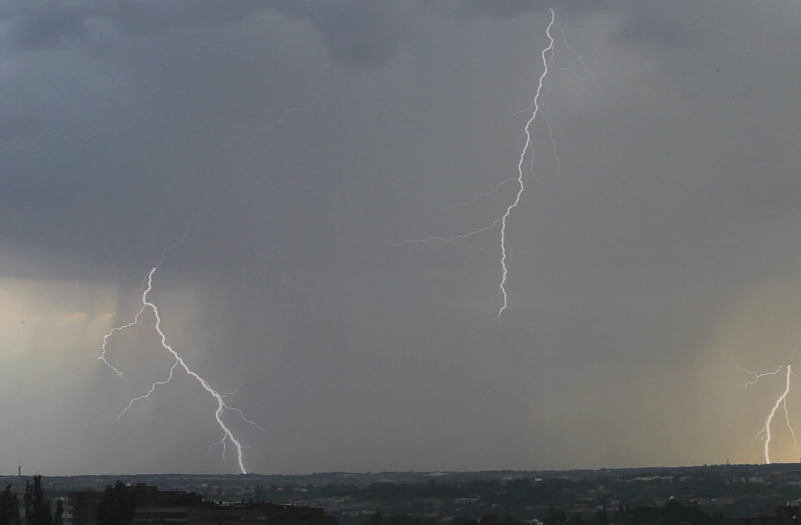 Cumulonimbo